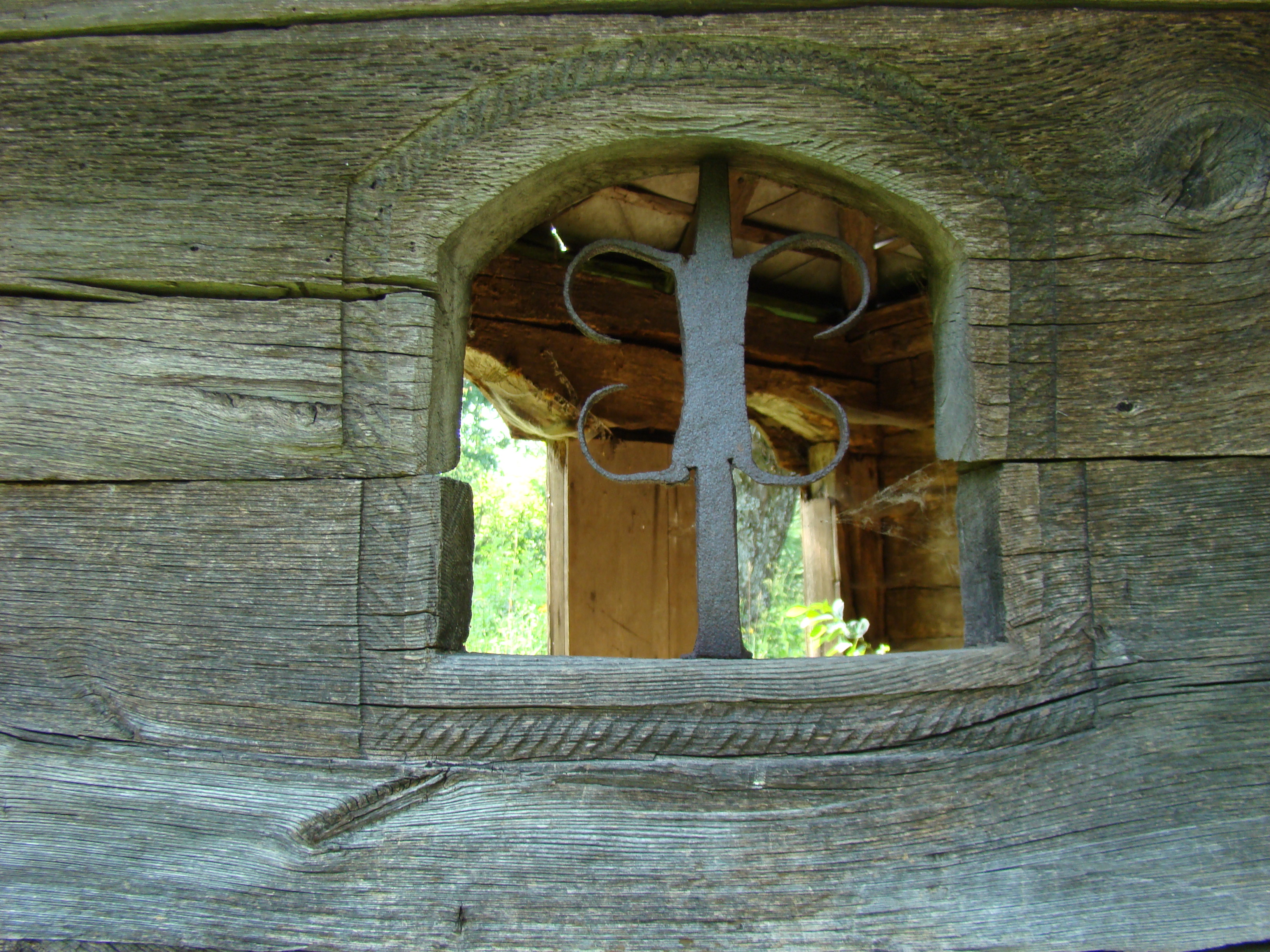 Absida bisericii de lemn "Sf. Arhangheli Mihail şi Gavril" , sat aparţinător CUFOAIA; oraş TÂRGU LĂPUŞ